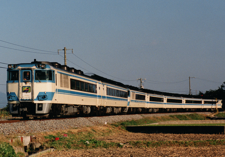 JR四国 キハ181系特急形気動車 特急「しまんと」（団体輸送で増結）